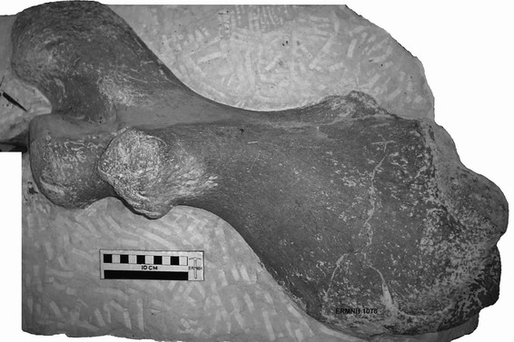 Fossil of Gigantatypus, an extinct turtle - Eternal River Museum